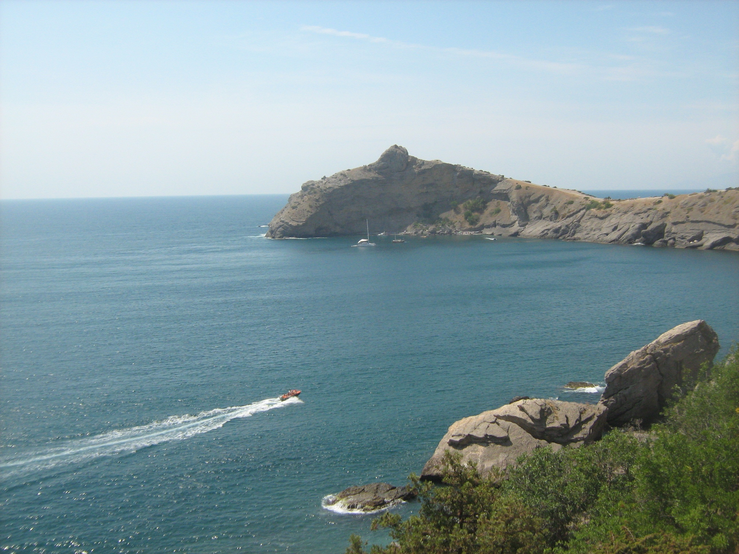 Мыс Капчик. Новый Свет, Крым